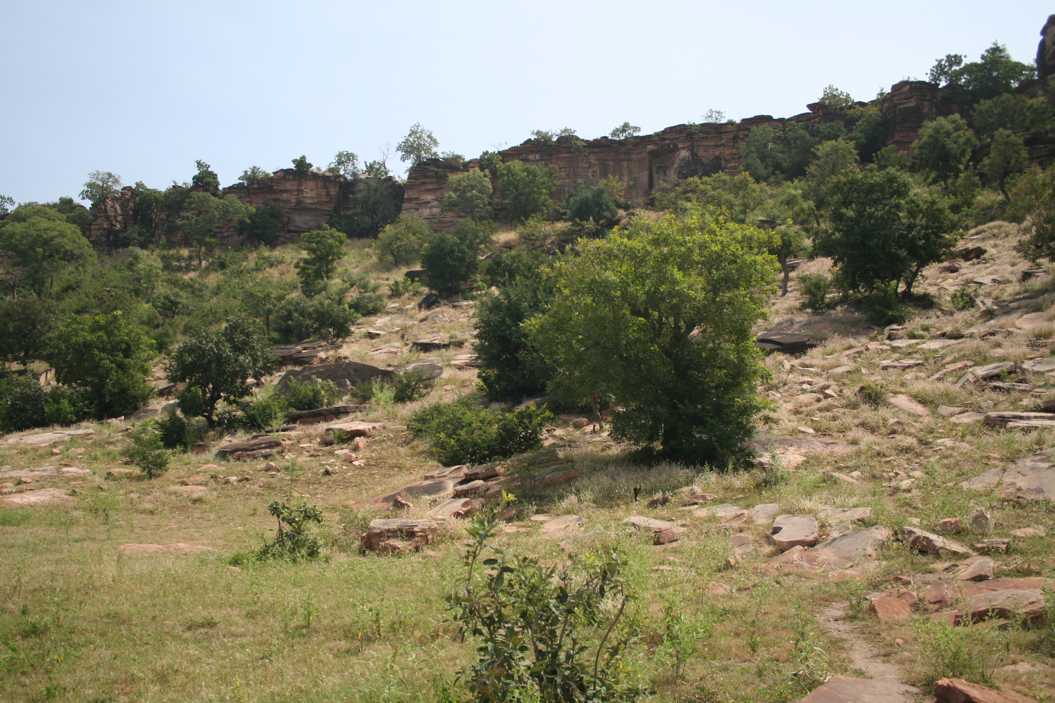 Chaine de Gobnangou near Tamabaga, Tapoa, Burkina Faso